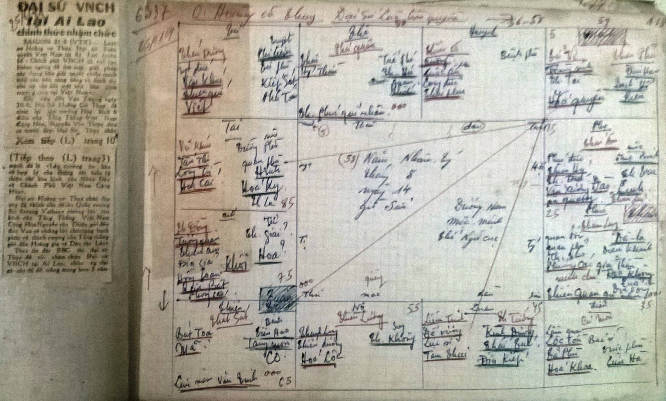 ex-ambassadeur